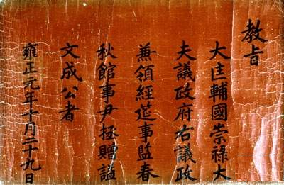 조선의 문신, 정치인 명재 윤증의 시호 상시 교지(1723년)